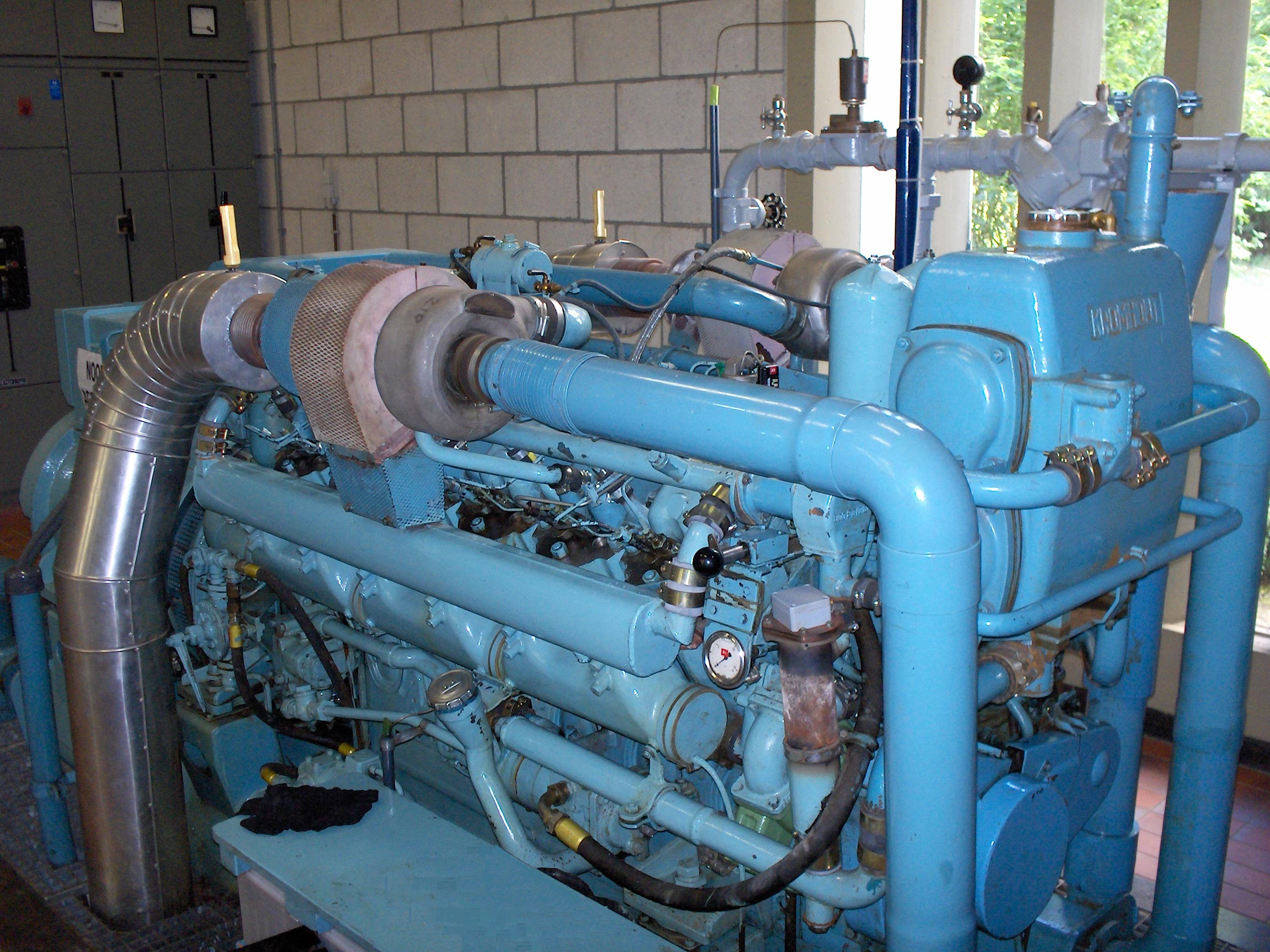 Holset turbo on diesel engine. Holset turbocharger (x2), on 450 hp (340 kW) V12 Kromhout diesel engine.